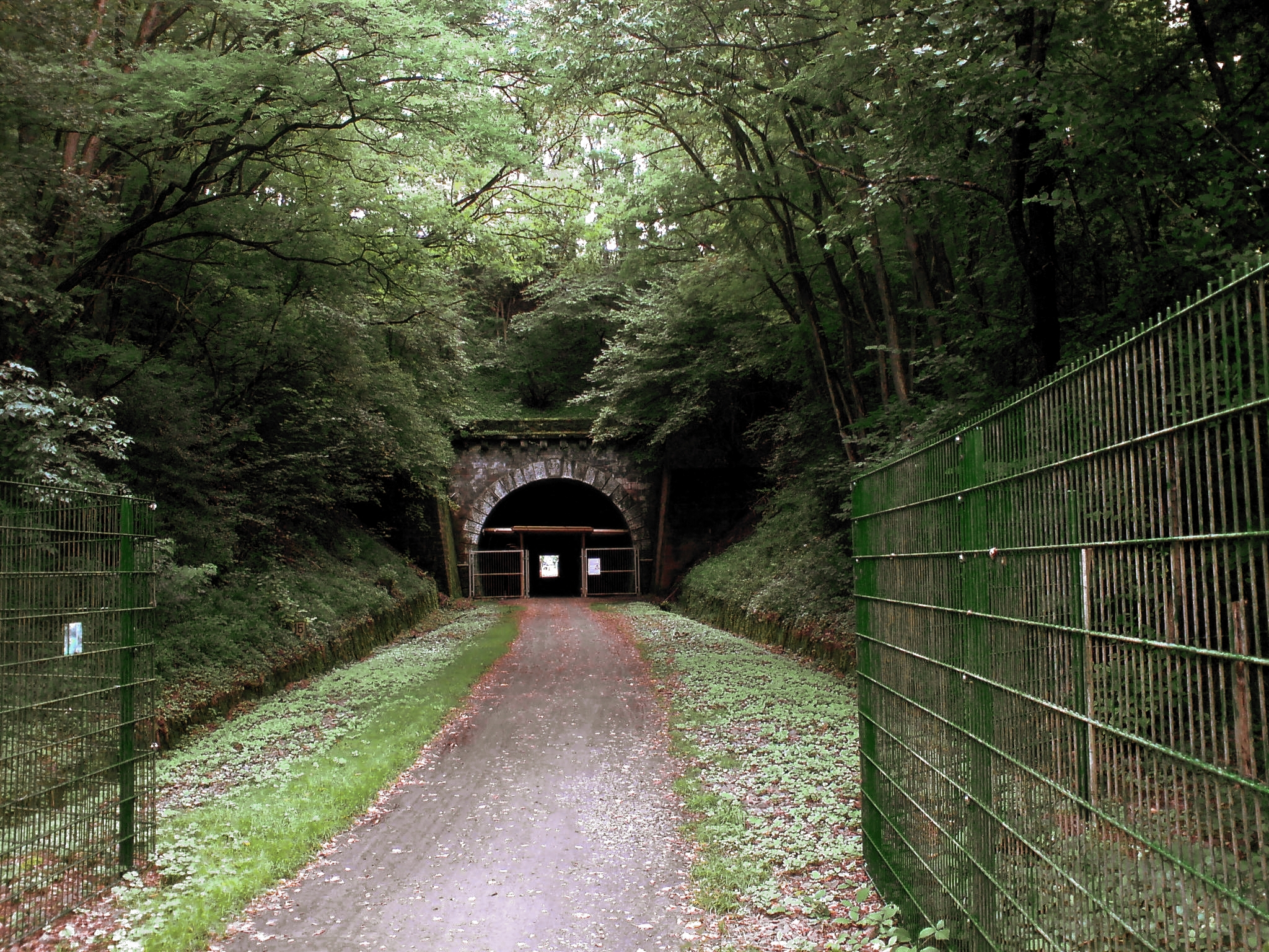 Der Elschbacher Tunnel von der Dietschweiler Seite aus gesehen.